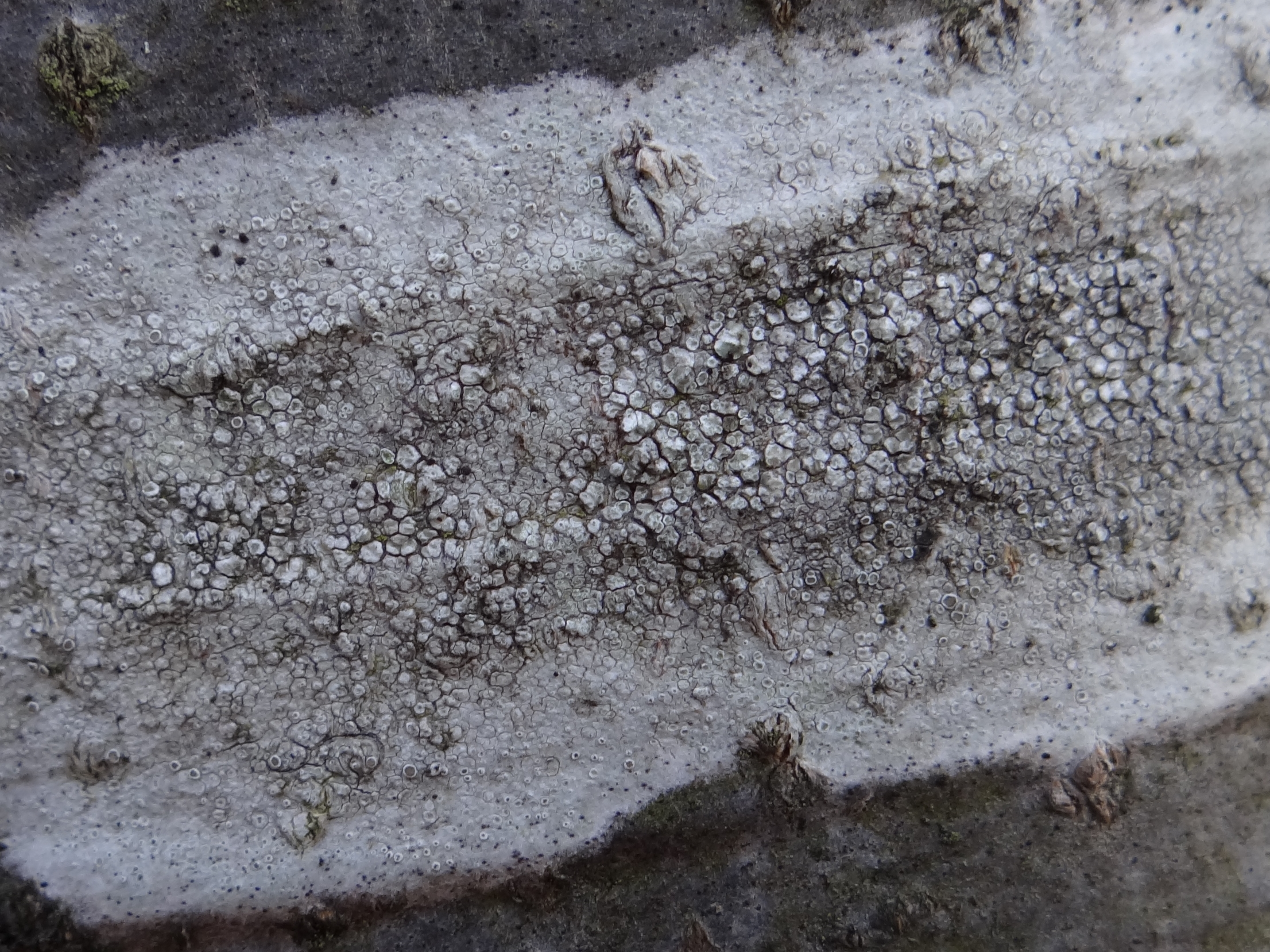 Lecanora carpinea on Fagus sylvatica (location: Poland, Kamionna (województwo małopolskie)